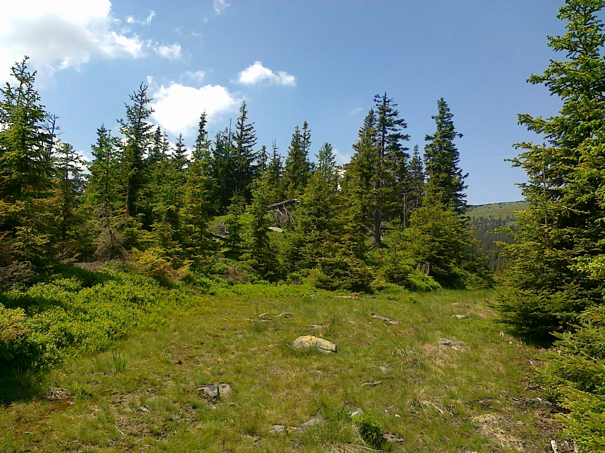 Połać szczytowa góry Malý Máj-SZ - 1182 m n.p.m.